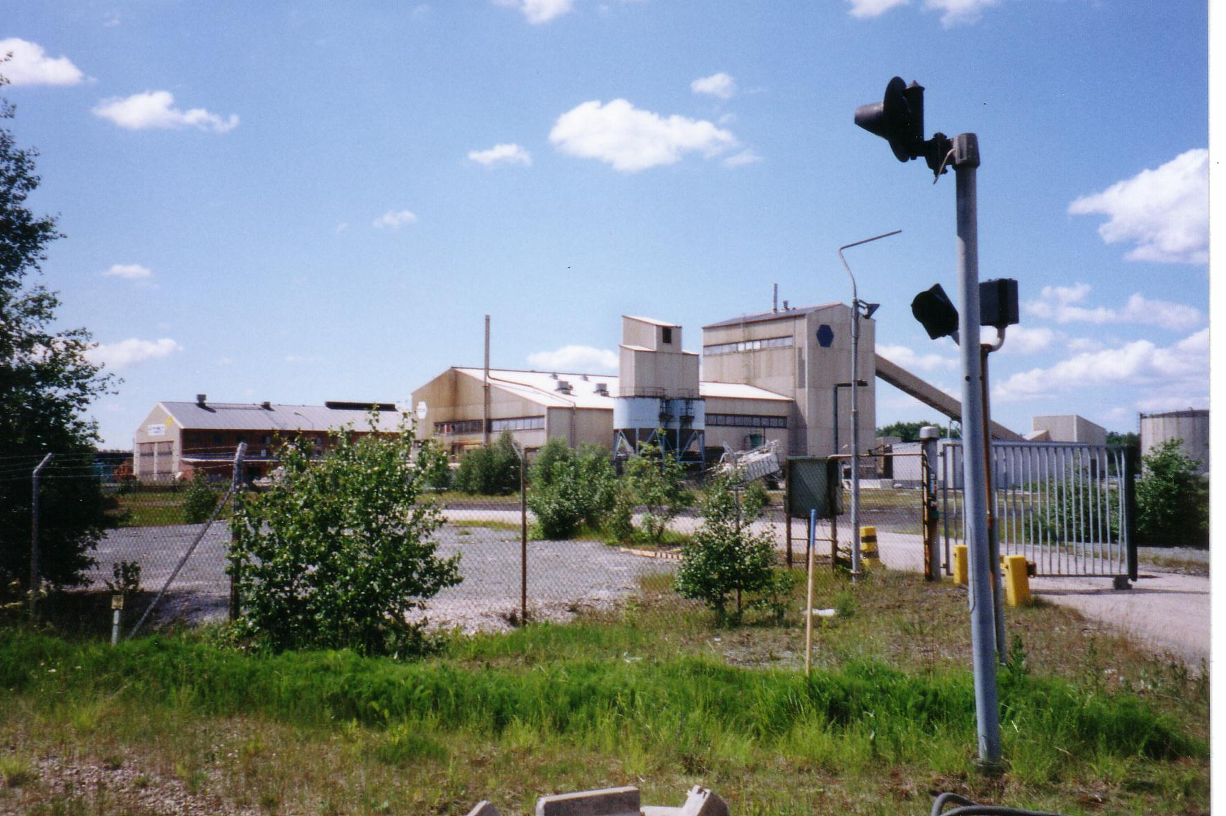 Ferrolegeringars kalkpelletsverk från början av 1970-talet